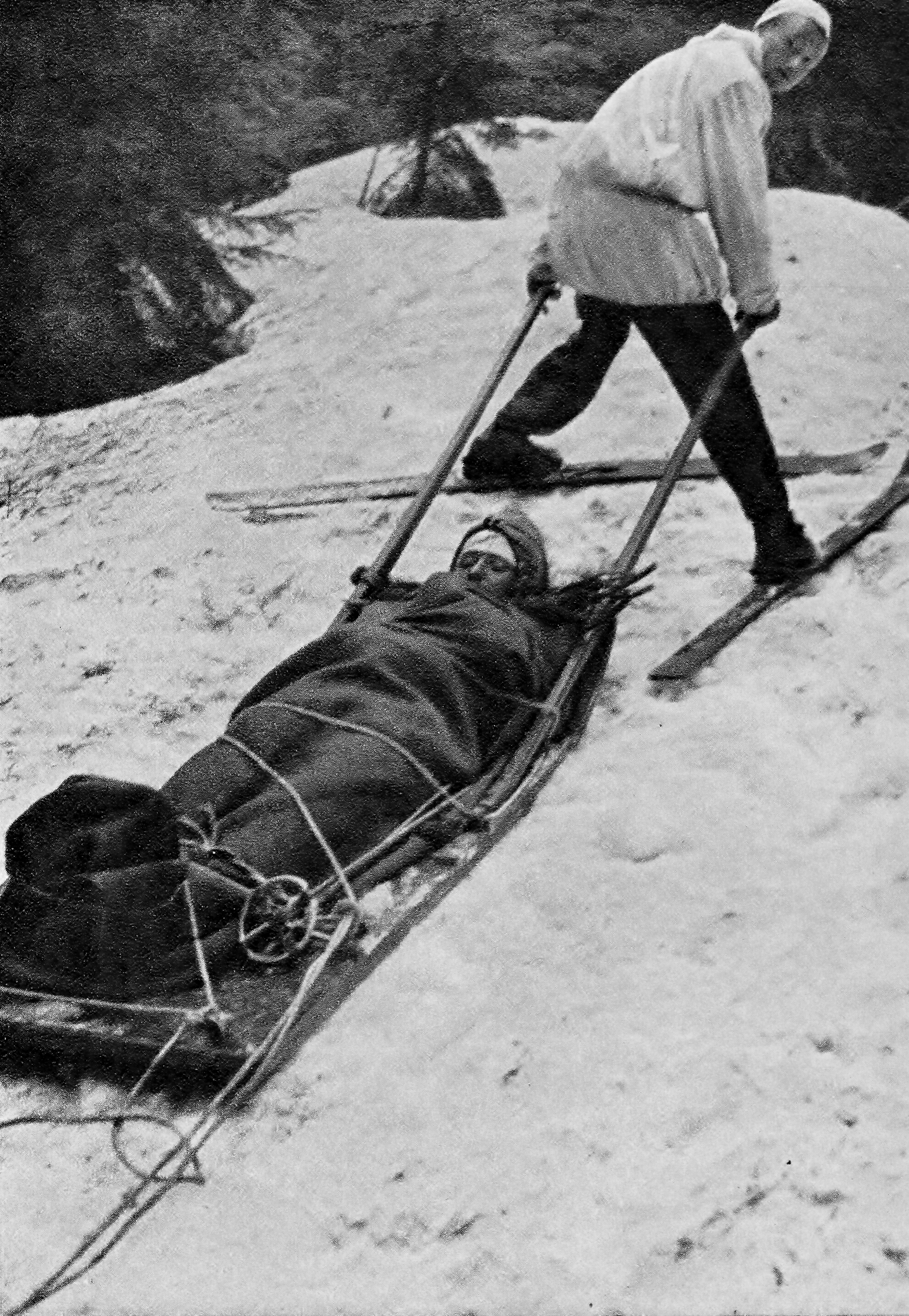 Kanadské sane Tatranskej horskej služby, na ktorých zvážali zranených.